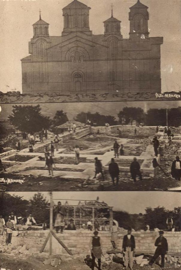 Започнување на градбата и идејното решение на црквата „Успение на Пресвета Богородица“ во битолско Трново